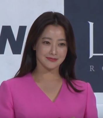 2018년 10월 2일 tvN 토일드라마 '나인룸' 제작발표회